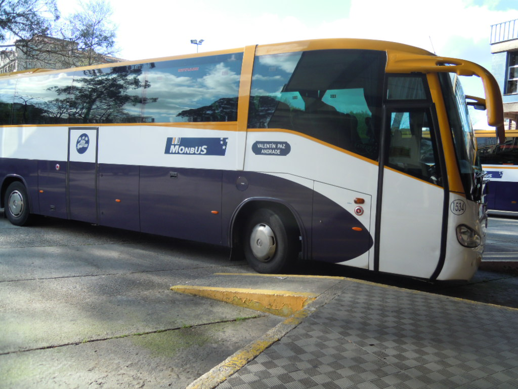 Autobús da empresa Monbus co nome de Valentín Paz-Andrade na estación de autobuses de Pontevedra